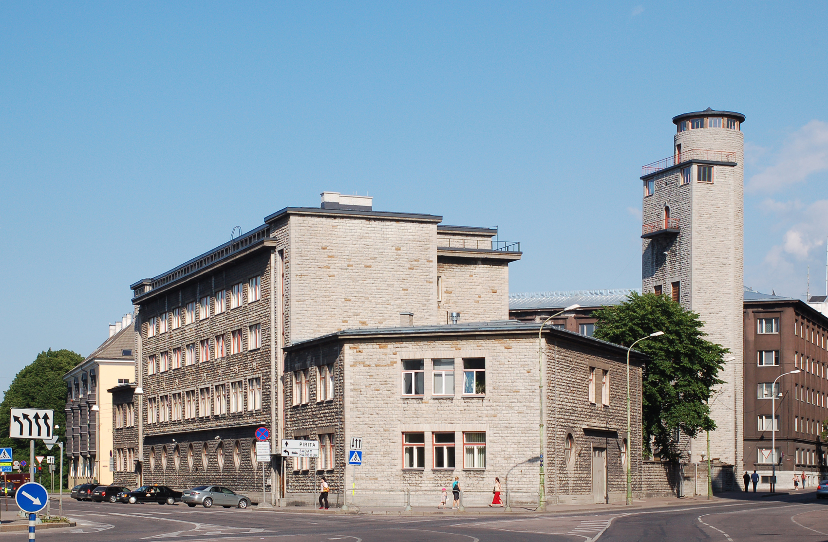 Tuletõrjehoone Tallinnas Raua tn, arhitekt Herbert Johanson, valmis 1939